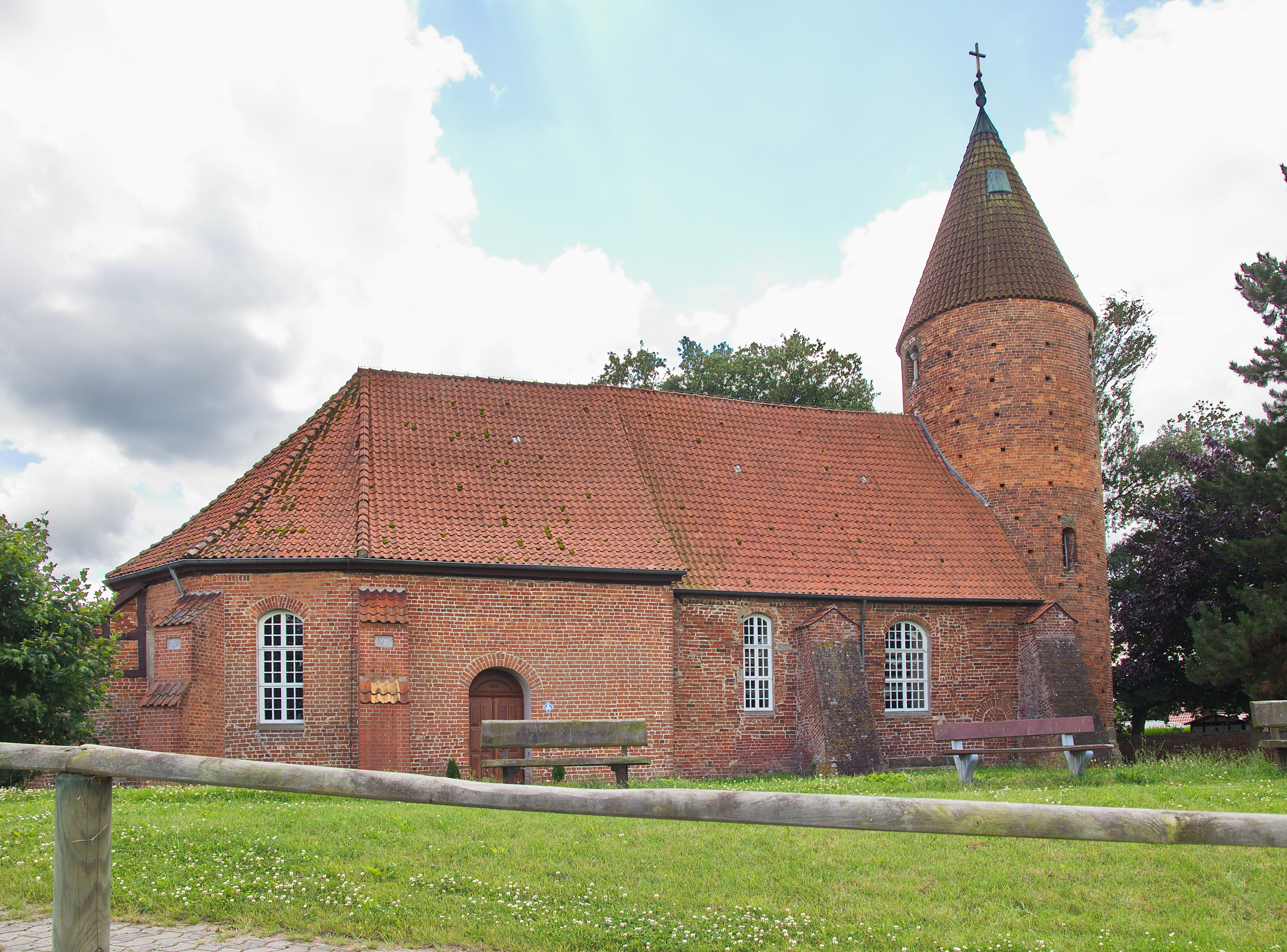 Kirche St.Annen in Westen (Dörverden) in Westen (Dörverden), Niedersachsen, Deutschland.